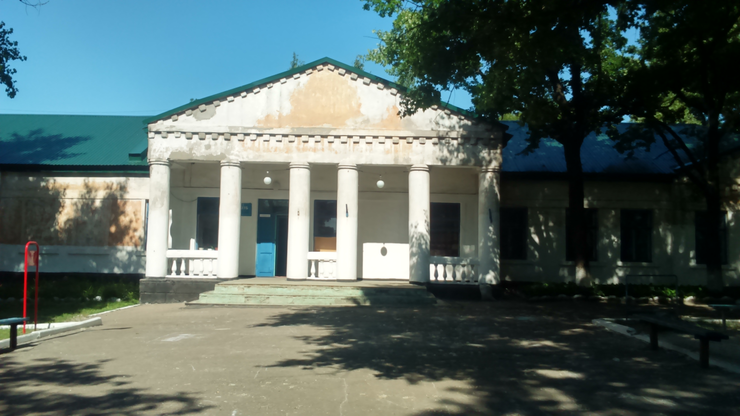 Водя́нське — селище міського типу Донецької області, підпорядковане Білицькому, розташоване на річці Водяна за 93 км від Донецька. Відстань до райцентру становить близько 6 км і проходить автошляхом місцевого значення.